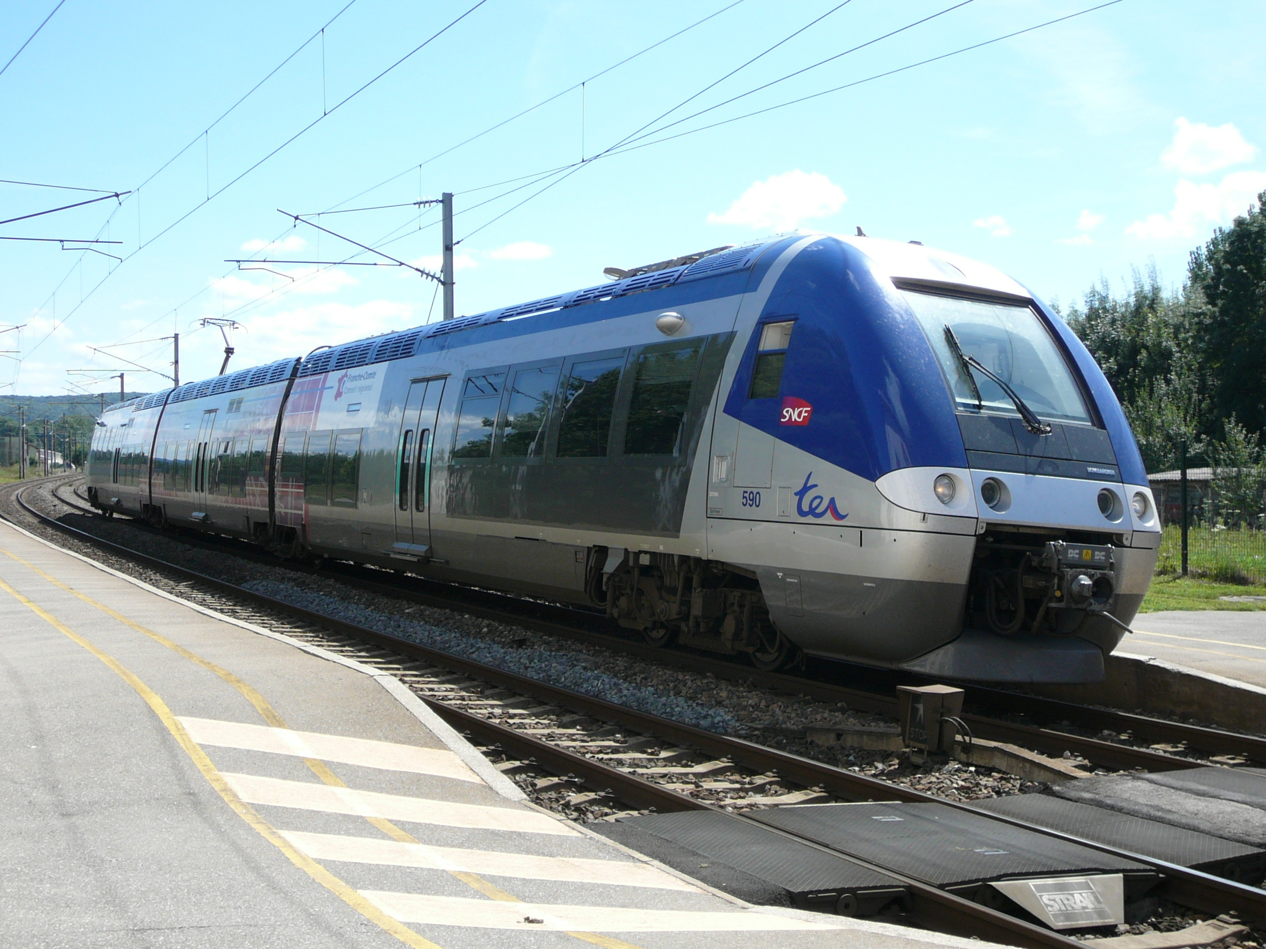 ZGC assurant un TER Lons-le-Saunier - Besançon-Viotte en gare d'Arc-et-Senans